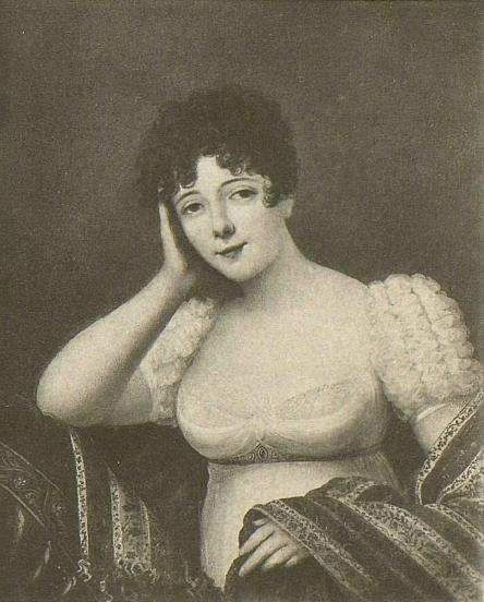 Жозефина Фридрихс (1778/1780—1824), фаворитка вел.кн. Константина Павловича